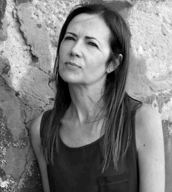 Retrato de Selena Millares